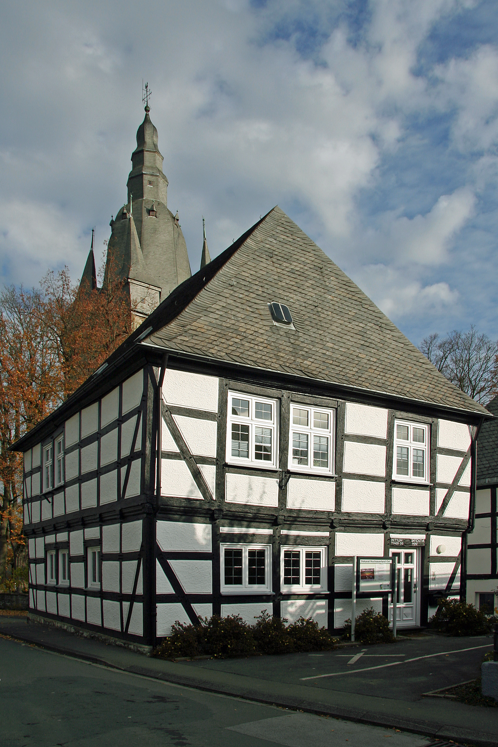 Altes Schulhaus an der Ecke Schulstraße/Probst-Meyer-Straße in Brilon. This image shows a heritage building in Germany, located in the North Rhine-Westphalian city Brilon.